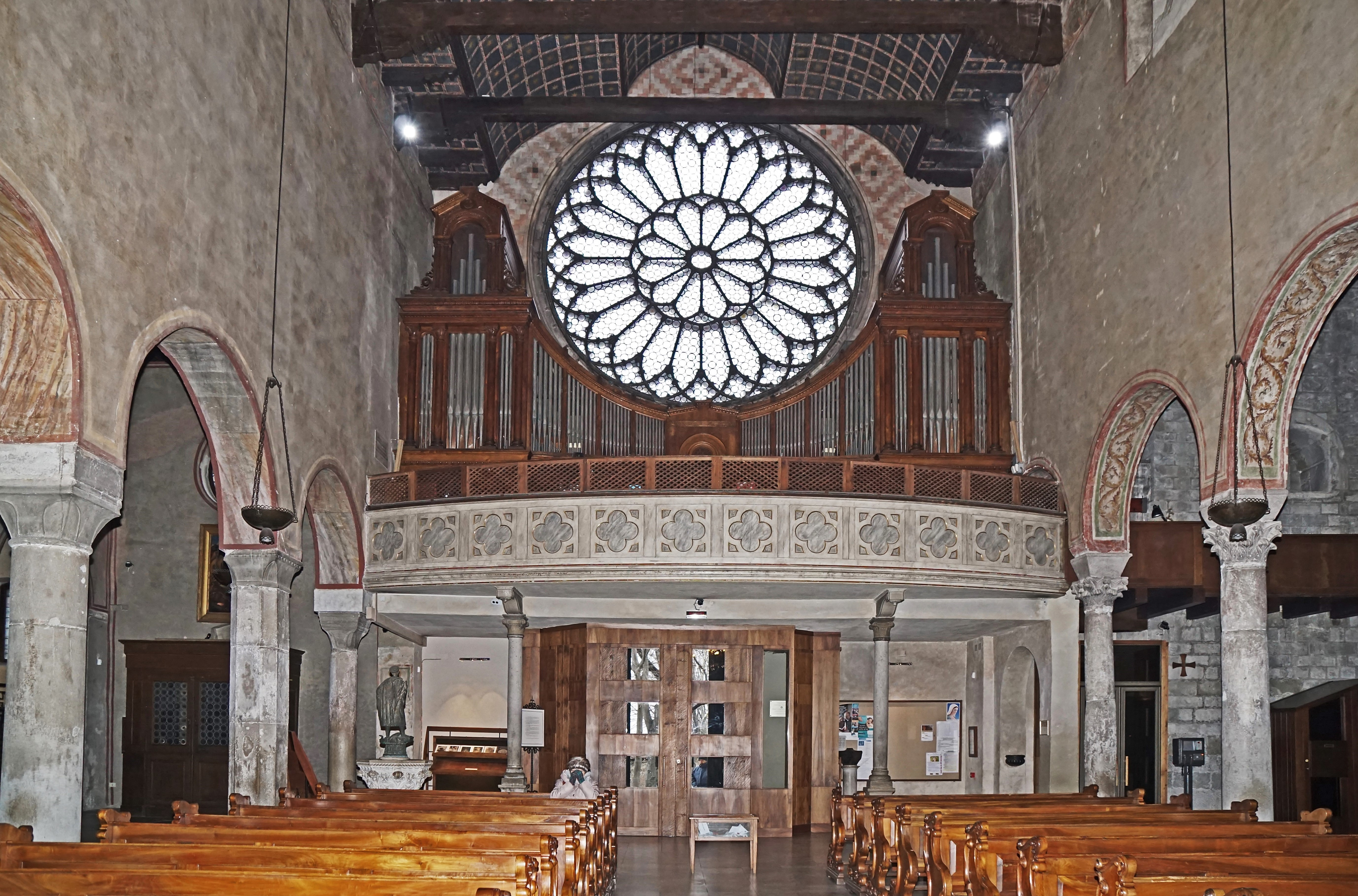 Triest, die Orgelempore der Kattedrale San Giusto